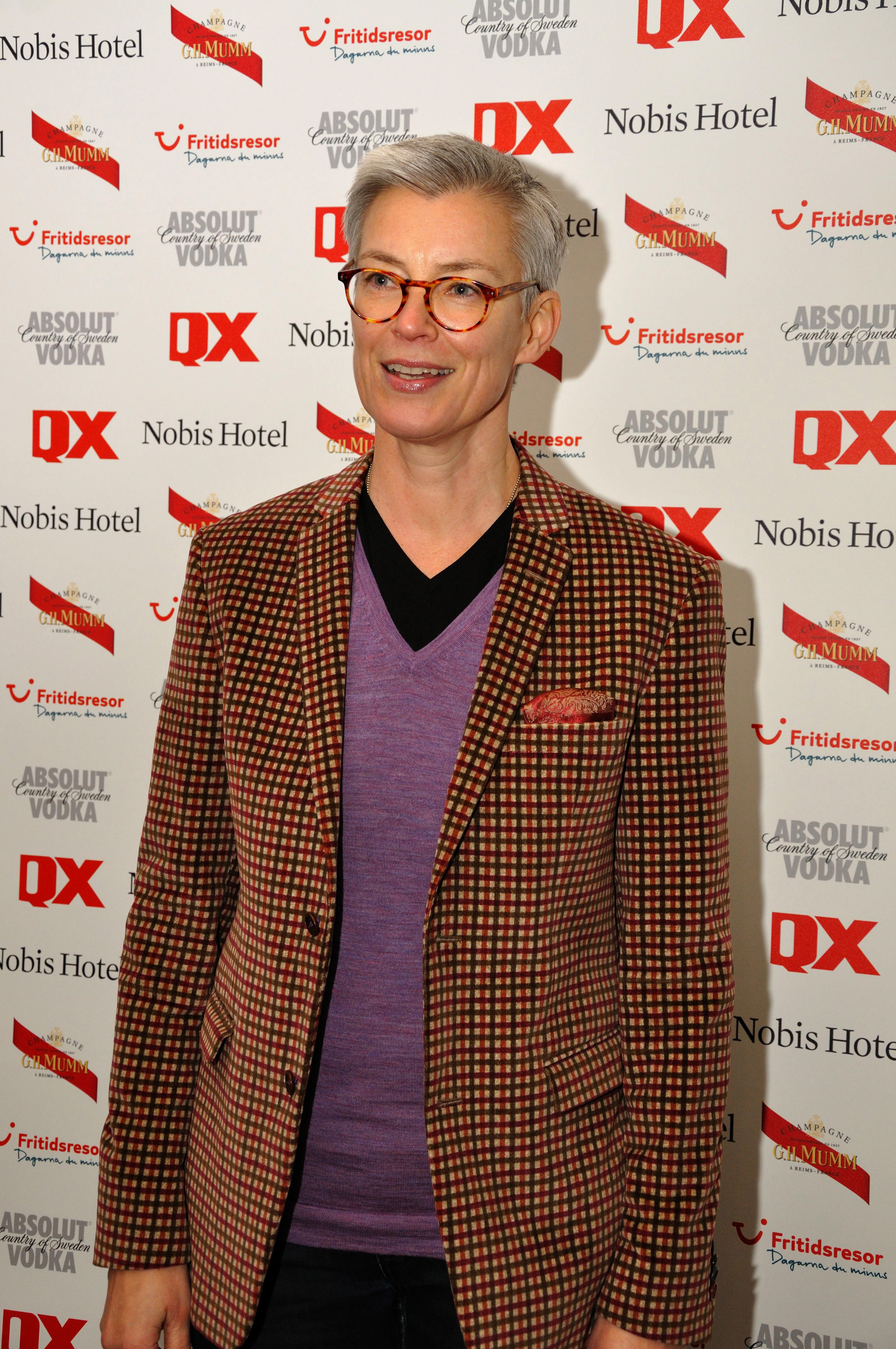 Gaygalan 2011 Tiina Rosenberg